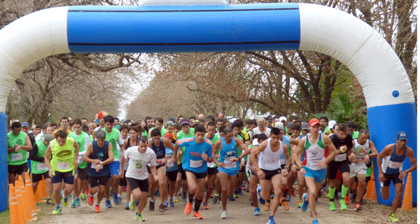 Maratón 2014